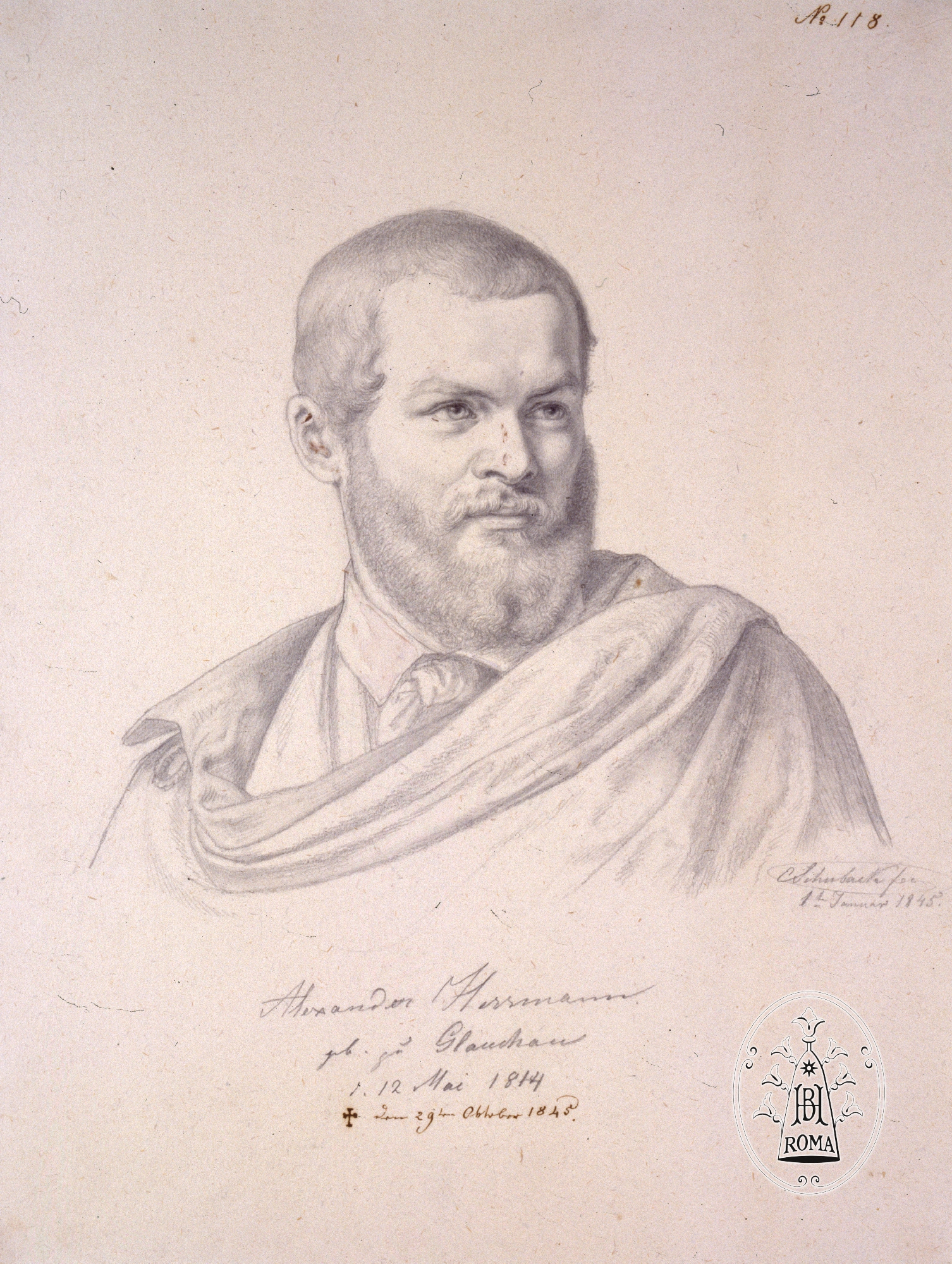 Porträt Alexander Herrmann, gezeichnet von Emil Gottlieb Schuback, Rom am 1. Januar 1845